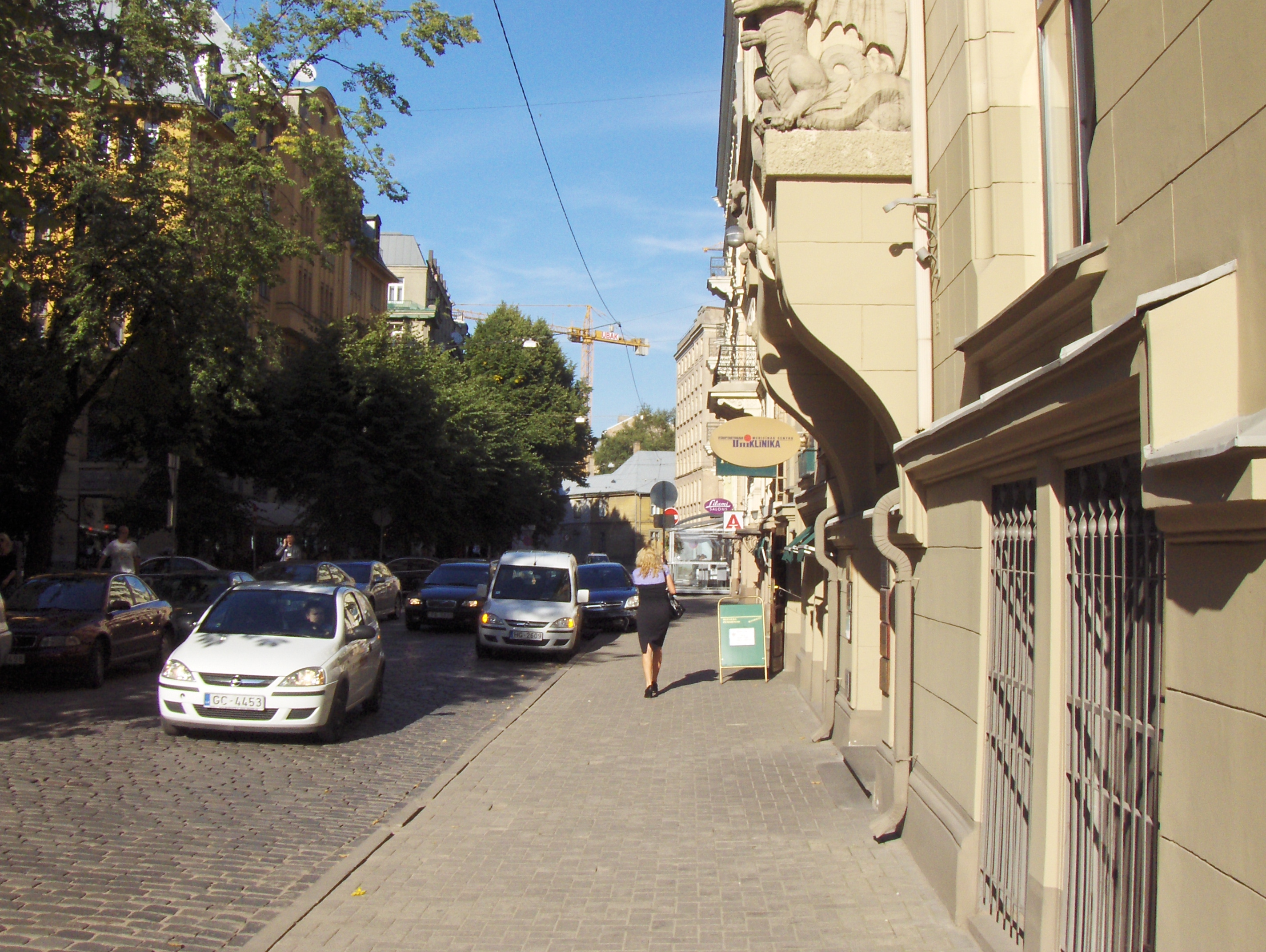 antonijas iela